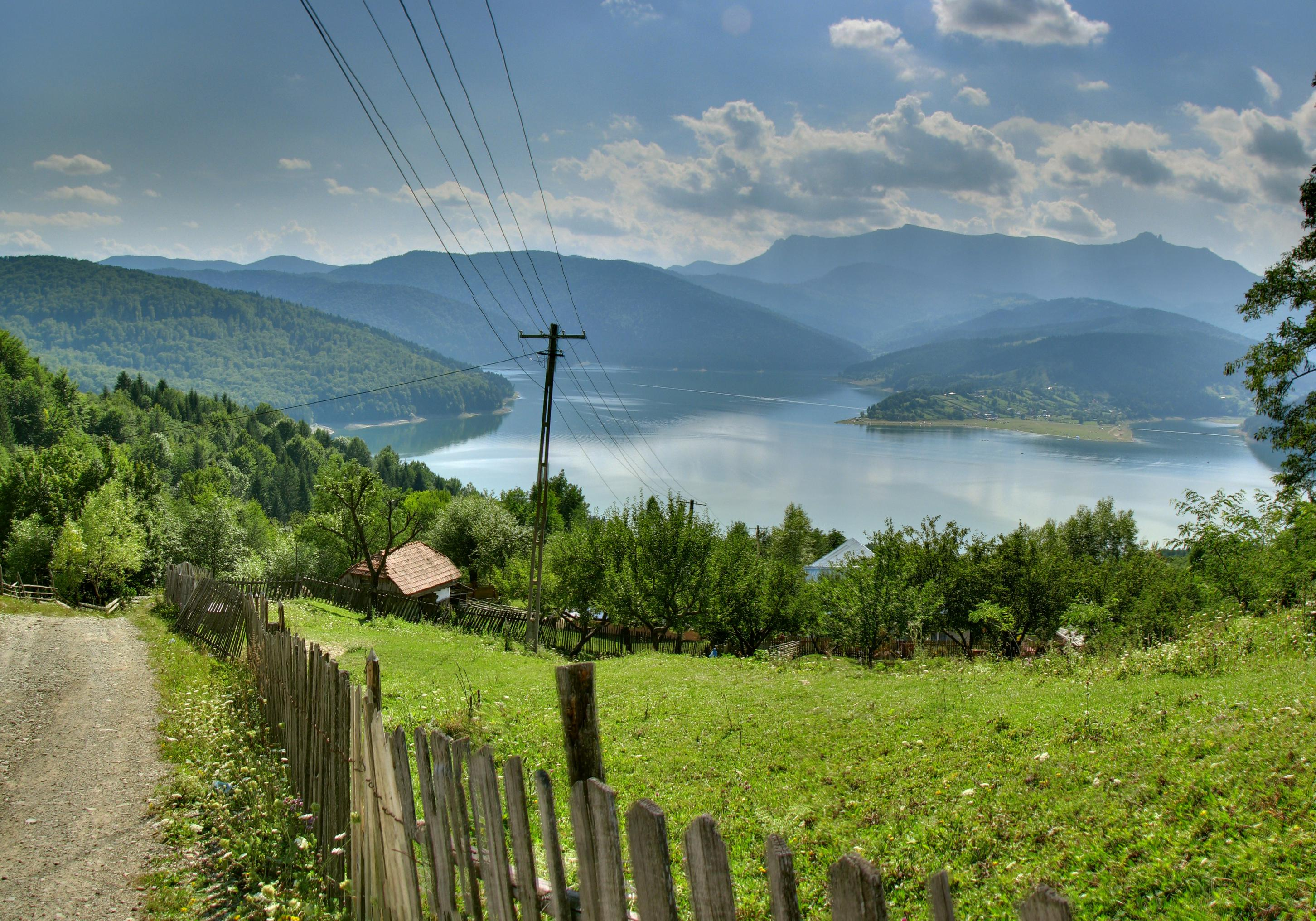 Lacul Izvorul Muntelui